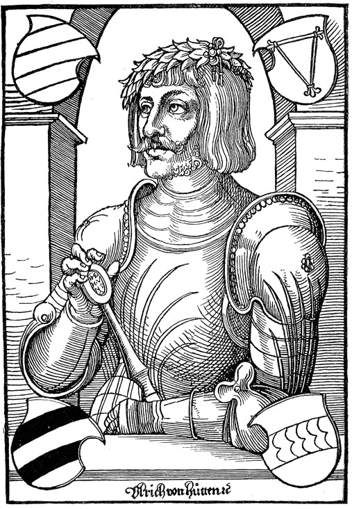 Ulrich von Hutten, tysk humanist.